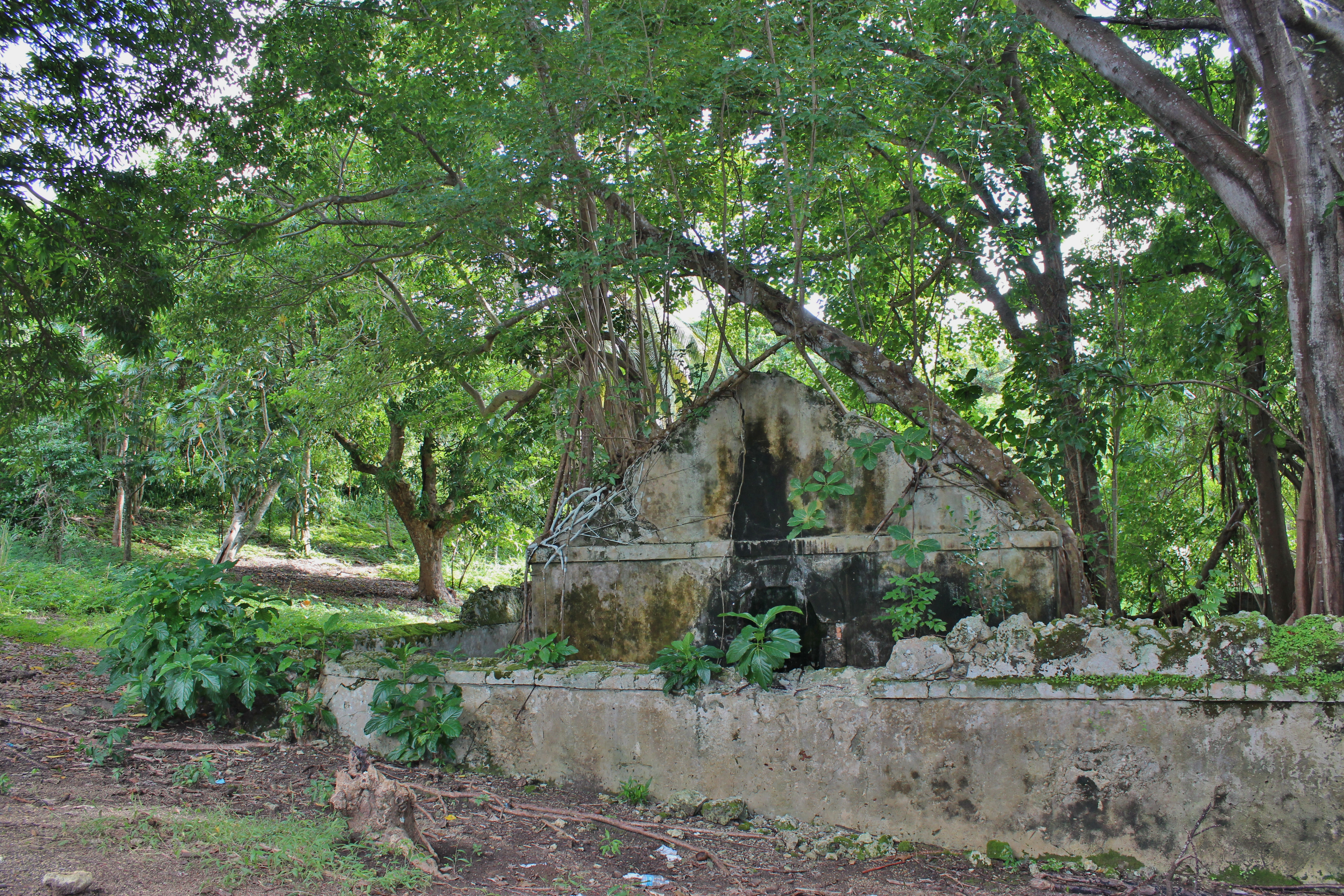 Ruines de l'ancienne prison à Petit-Canal, au milieu desquelles pousse un figuier maudit